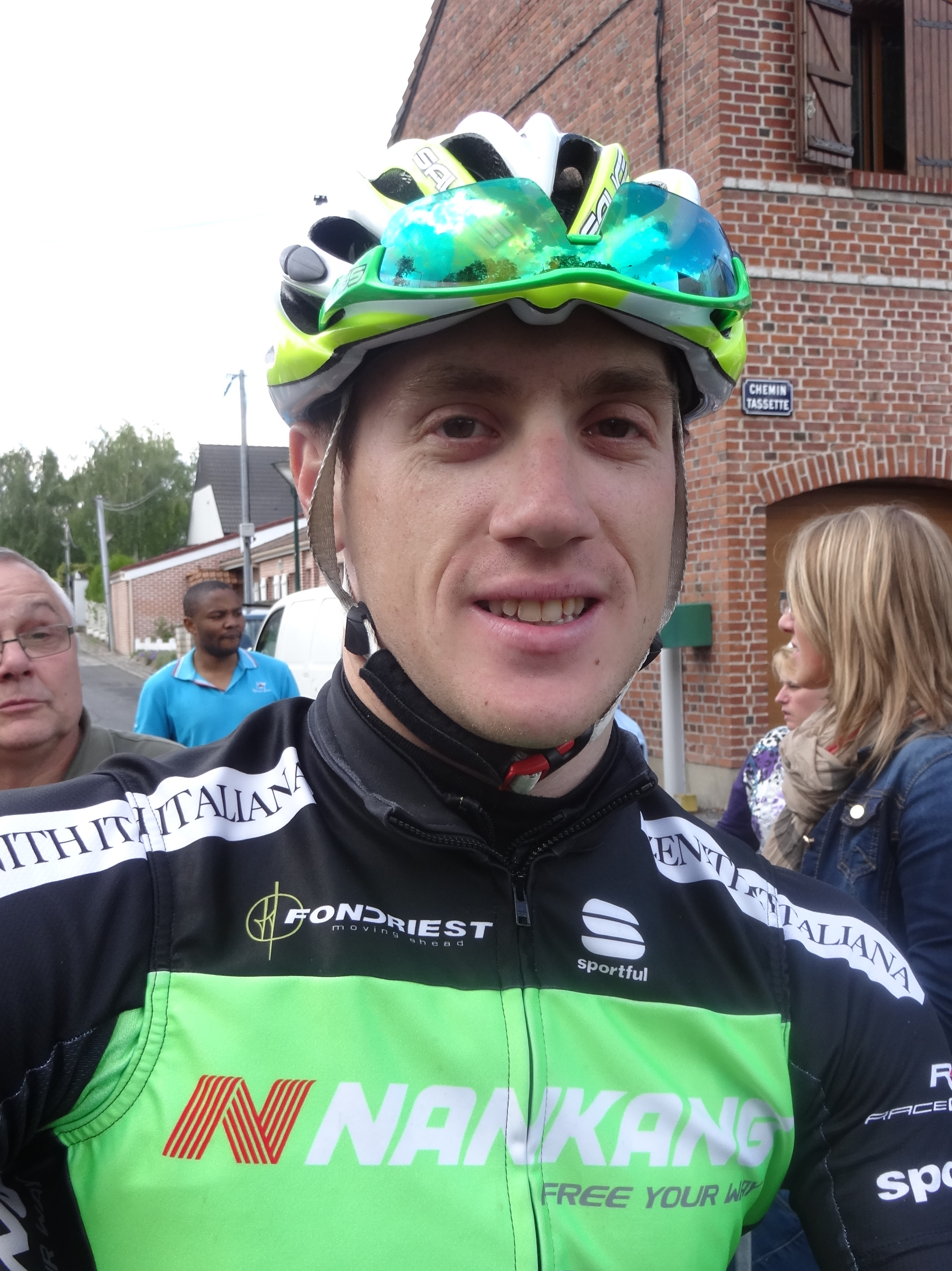 Reportage photographique réalisé le vendredi 23 mai 2014 à l'occasion du départ de la première étape du Paris-Arras Tour 2014 à Lens, Pas-de-Calais, Nord-Pas-de-Calais, France. Depicted person: Filippo Baggio Depicted team: Nankang-Fondriest